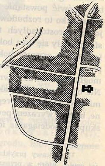 Беларуская (тарашкевіца): Слабодка (Słabodka)